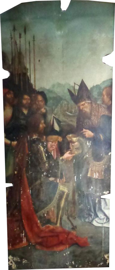 Trabalho de restauro do Laboratório José de Figueiredo.